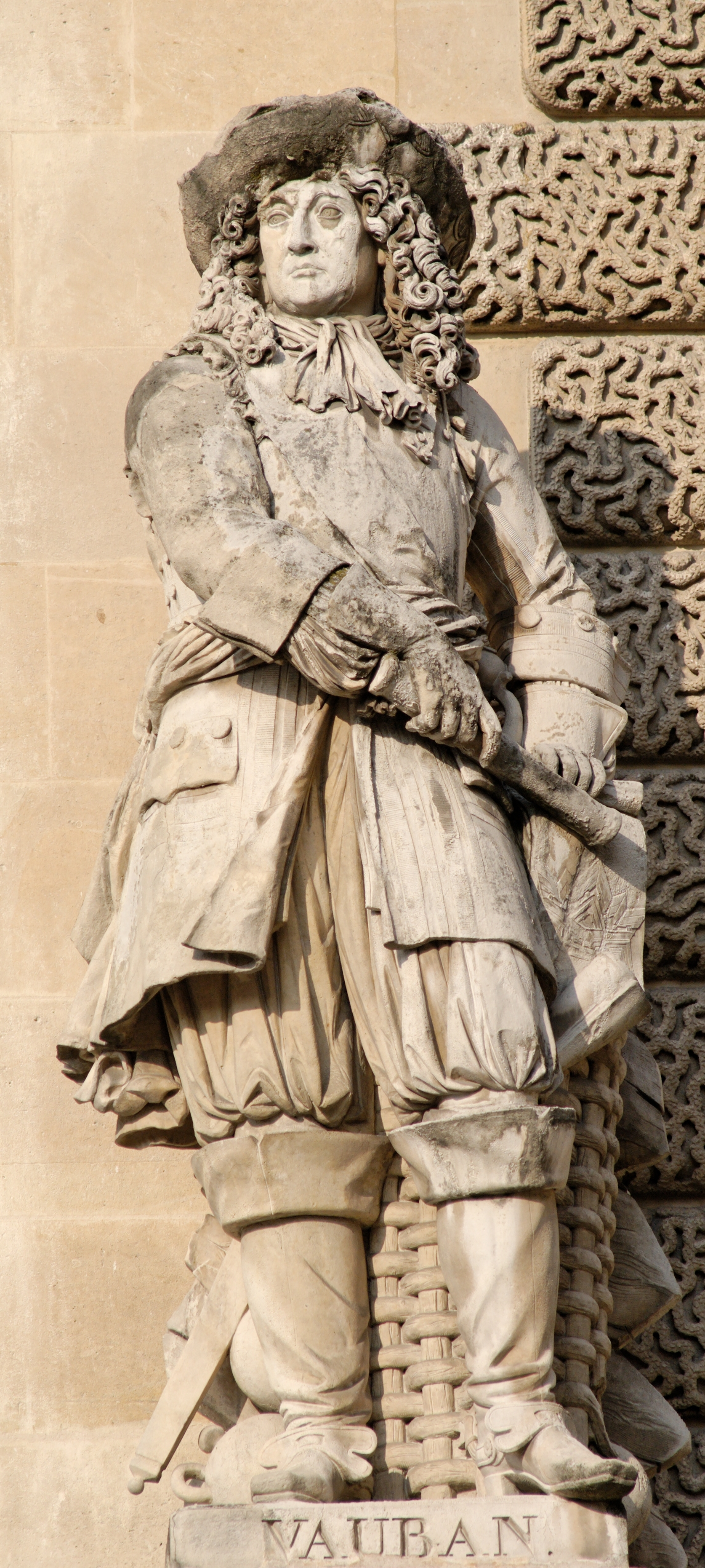 Portrait of Sébastien Le Prestre de Vauban (1633-1707), French engineer